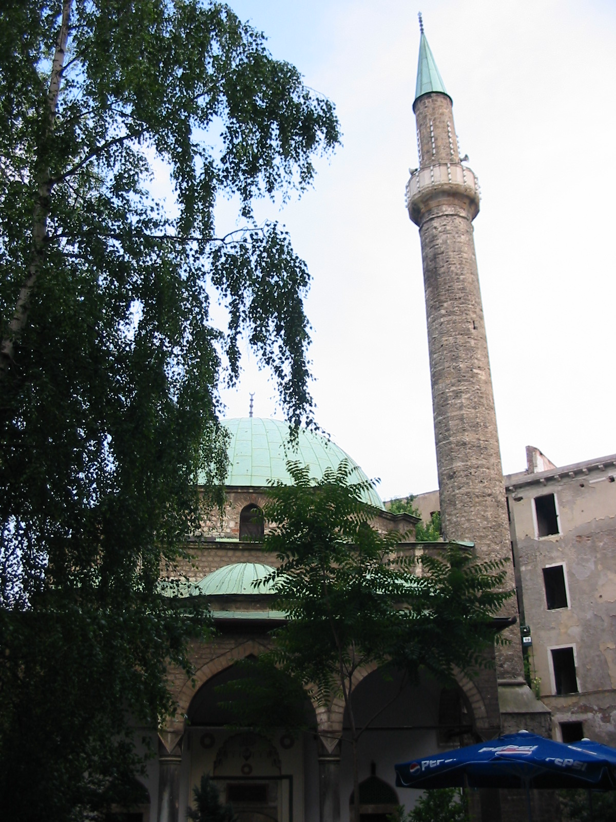 Ferhadija mosque in Sarajevo